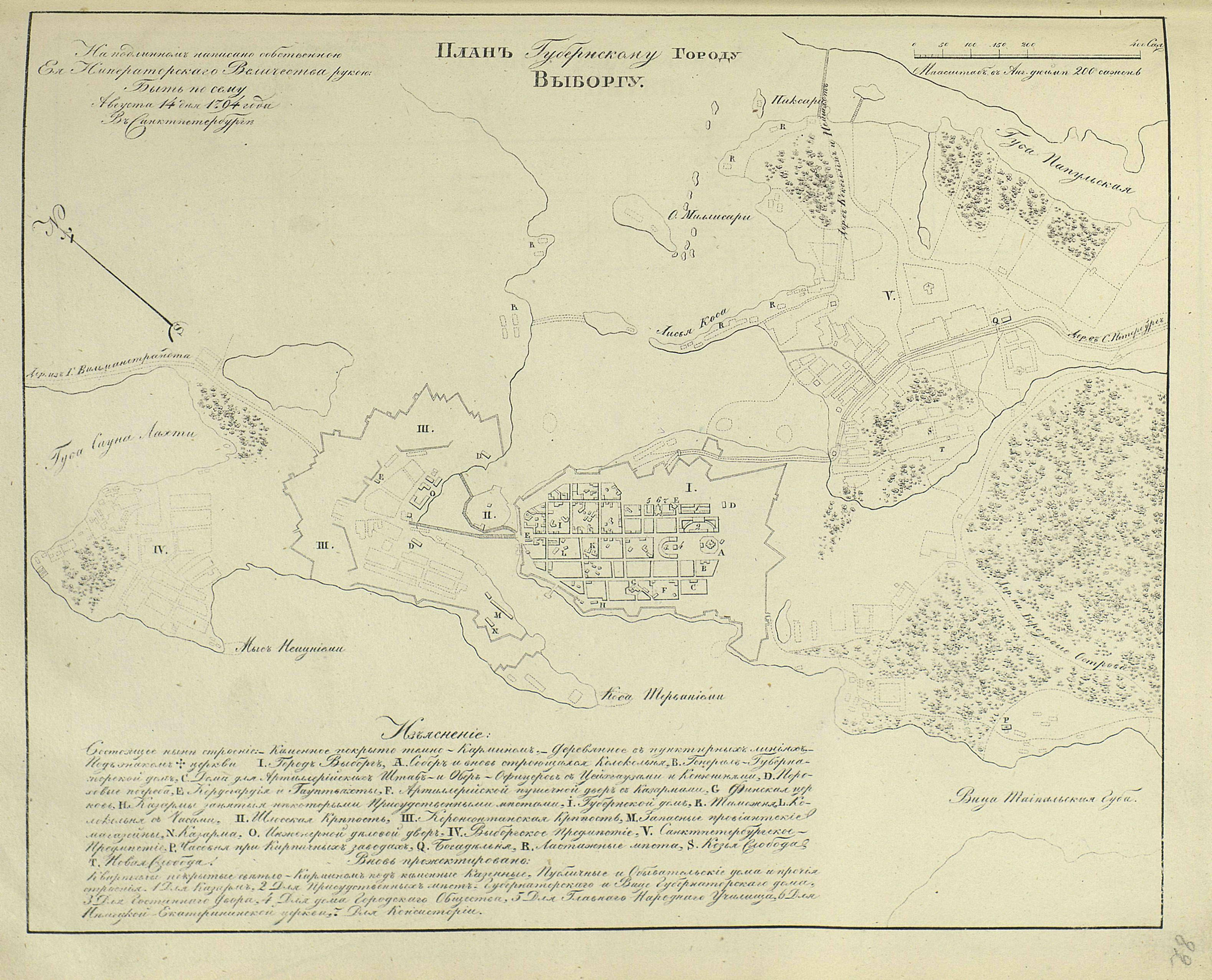 Полное Собрание Законов Российской Империи. Собрание первое. Книга чертежей и рисунков. (Планы городов).; 1839, Санктпетербургъ, Въ Типографіи II Отделенія Собственной Е. И. В. Канцеляріи.